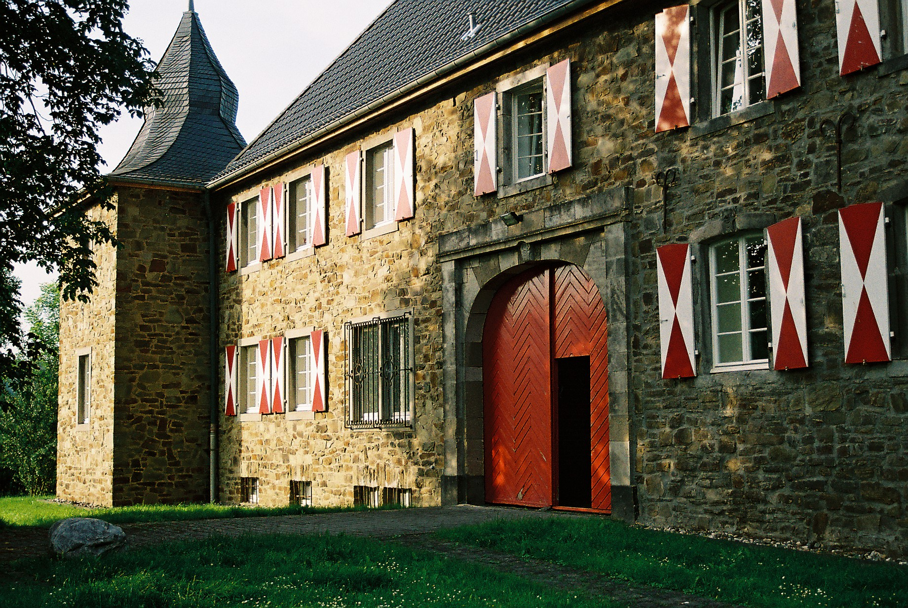 Haus Sülz in Lohmar